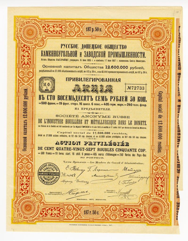 Привилегированная акция в 187 руб.50 коп. Русского Донецкого общества каменноугольной и заводской промышленности с основным капиталом в 12,6 млн. руб. Г. Макеевка, 1907 г.